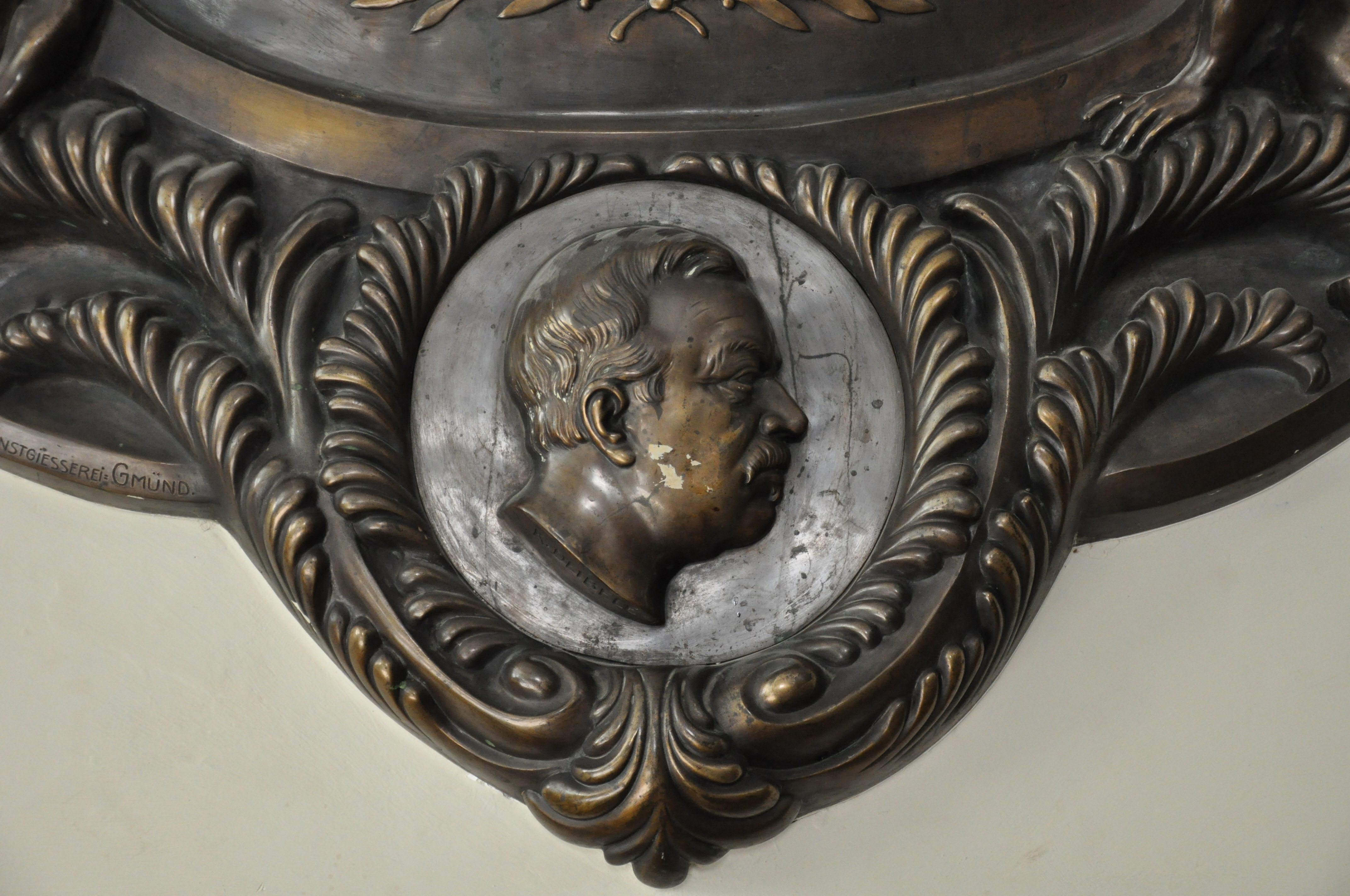 Ravensburg, „Spohn-Gebäude“ von 1914 (Sitz des Spohn-Gymnasiums und des Albert-Einstein-Gymnasiums)